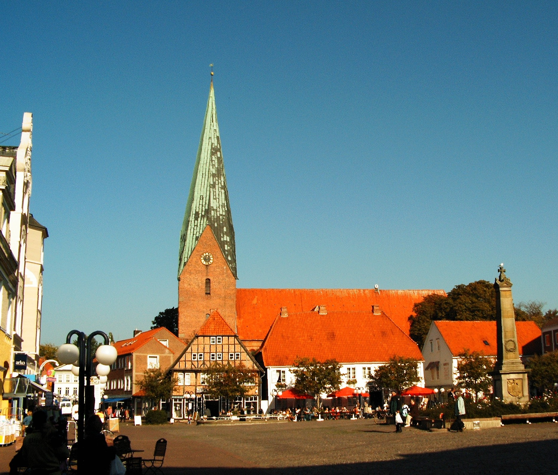 Marktplatz mit Kirche in Eutin / Schleswig Holstein